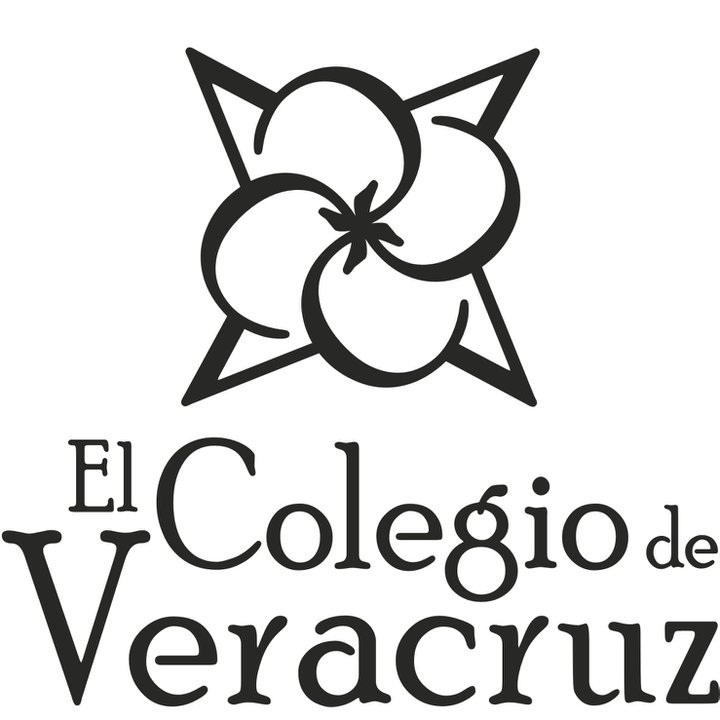 Logo de El Colegio de Veracruz